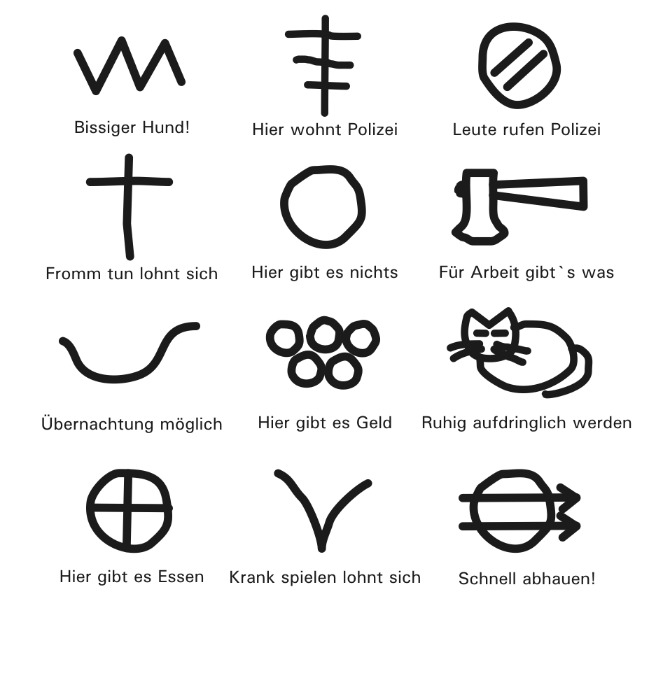 Traditionelle Gaunerzinken.